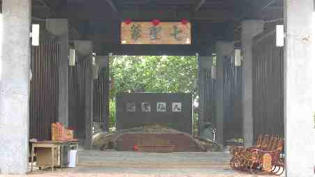 七壙廟正面照